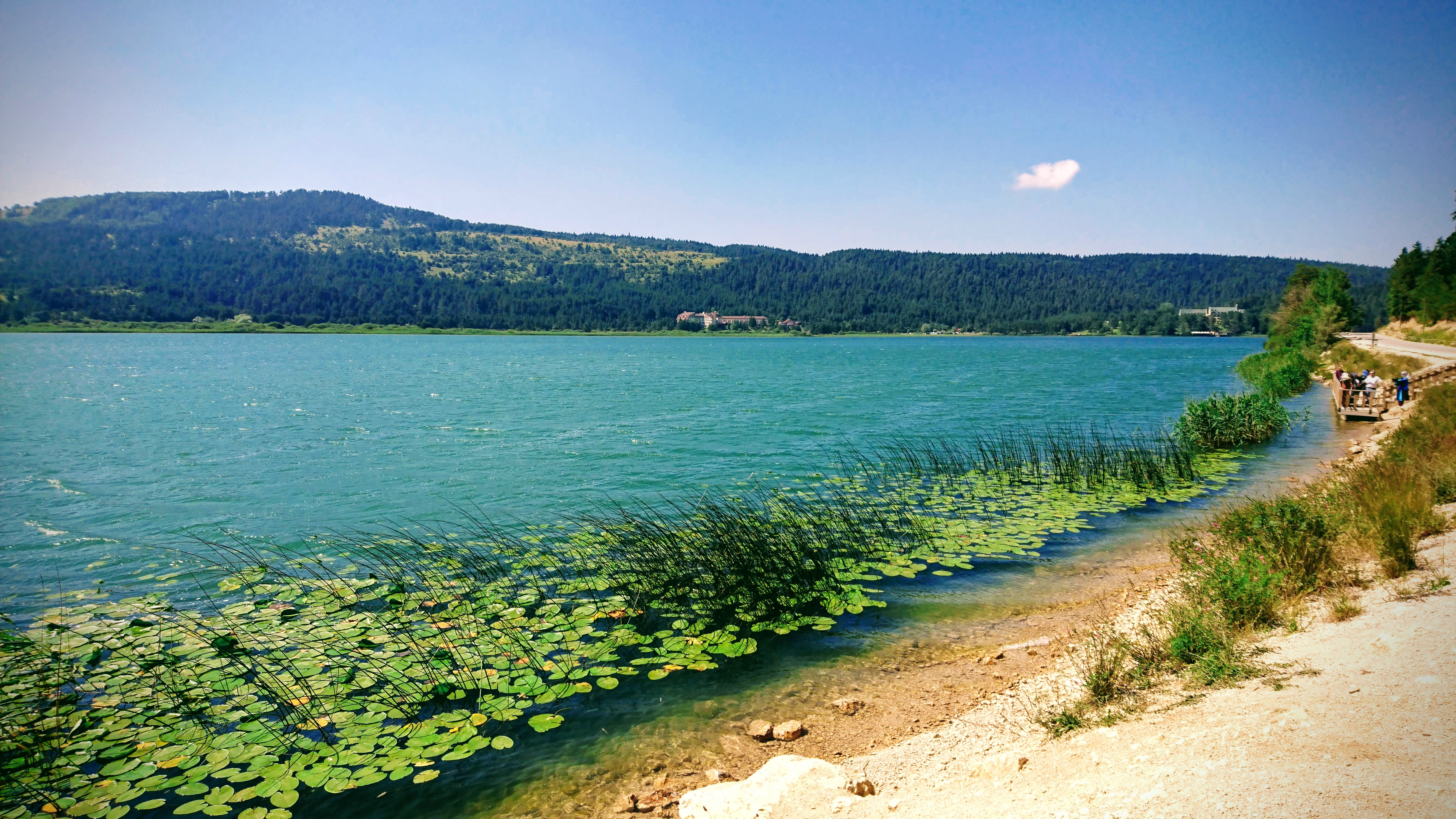 Diğer bir güzel Abant fotoğrafı